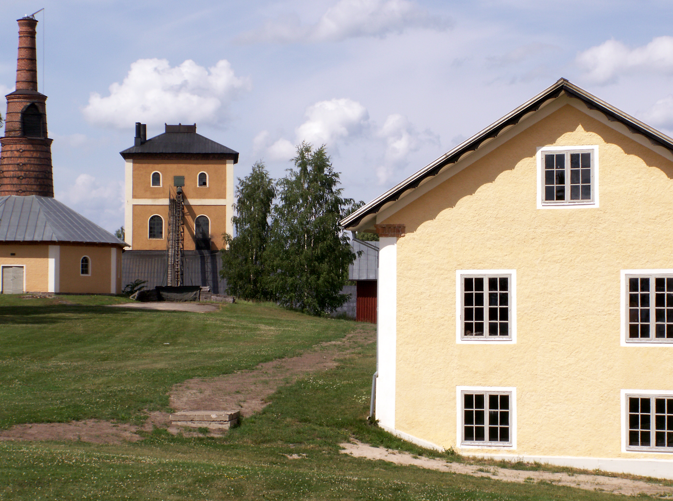 Byggnader, Brevens Bruk